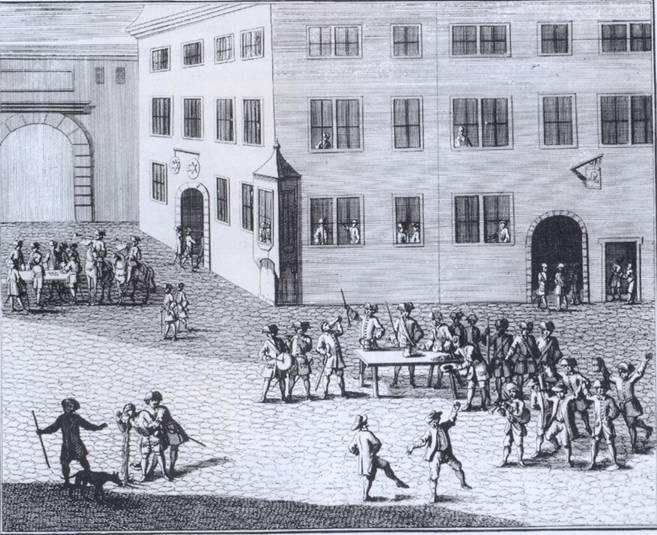 Werbung von Soldaten im 18. Jahrhundert